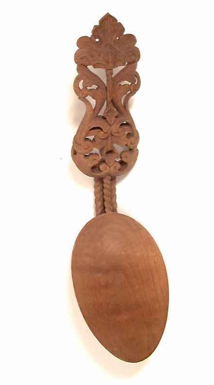 Treskje, skåret i bjørk av Ole Moene omkring 1875. Skjeen kommer fra Bernadottesamlingen.Foto Anne-Lise Reinsfelt/Norsk Folkemuseum, NF. 1915-0278.